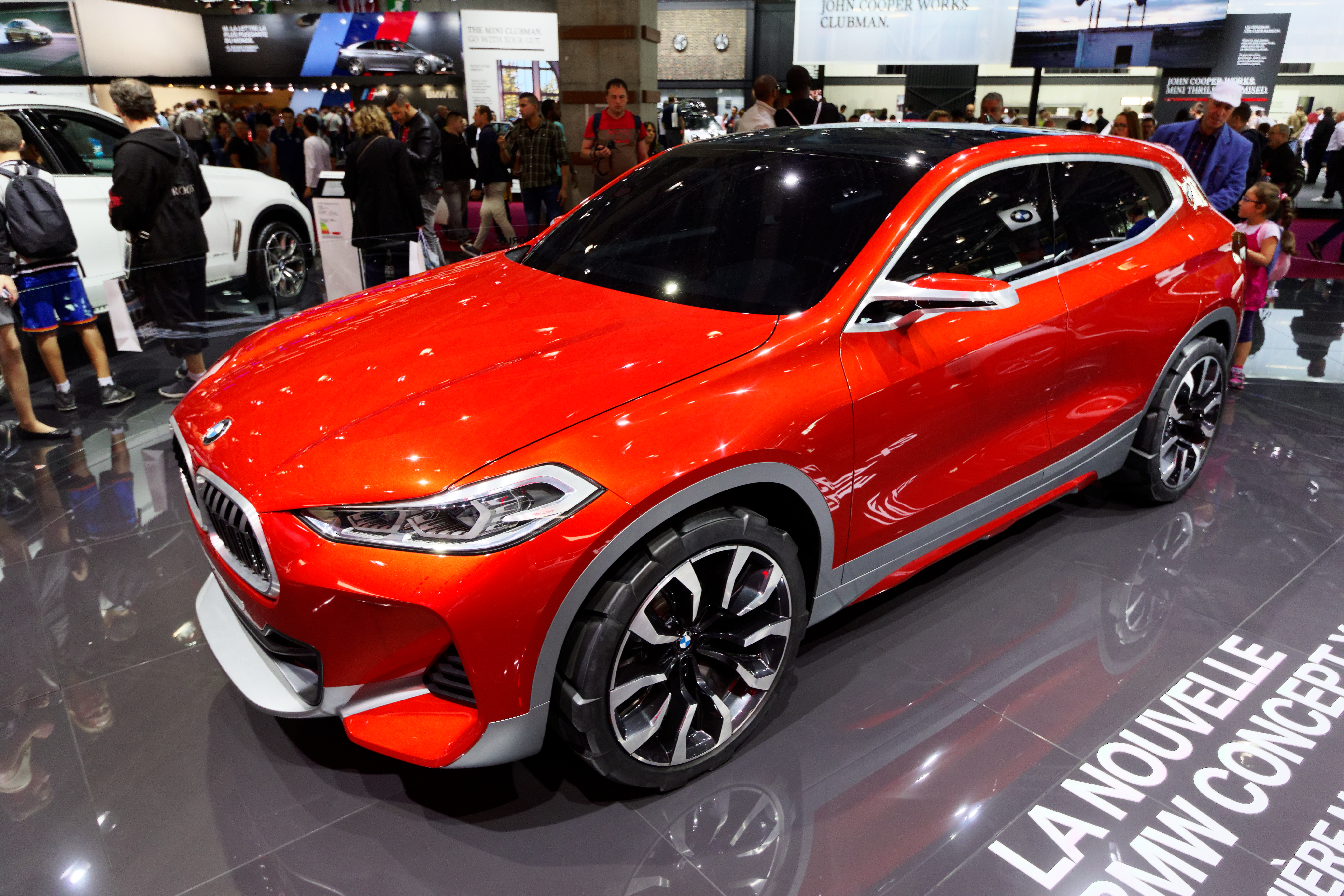 Une BMW concept X2 présentée lors du mondial de l'automobile de Paris 2016.